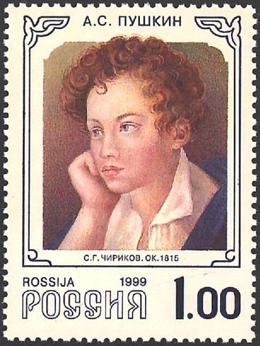 Почтовая марка России